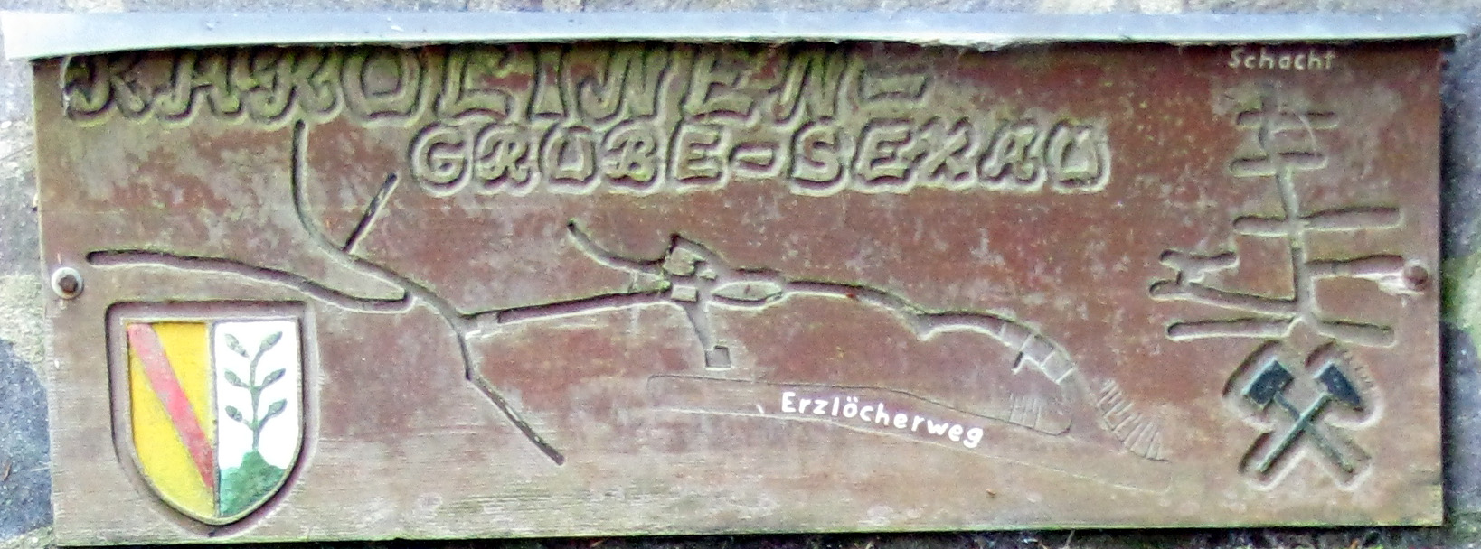 Grube Caroline in Sexau, Lageplan über dem Zugang